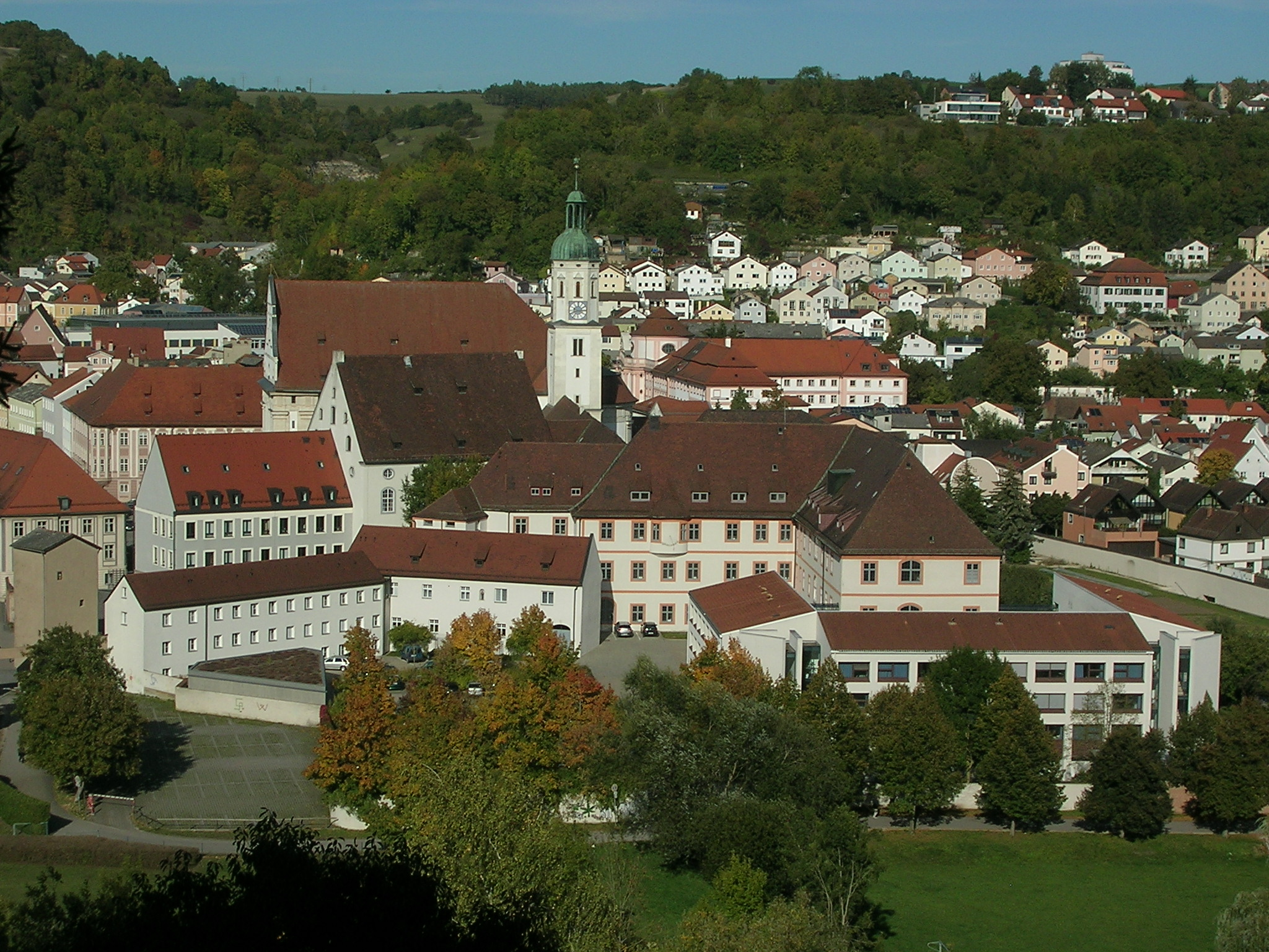 Priesterseminar Eichstätt von der Parkhausstraße aus gesehen.